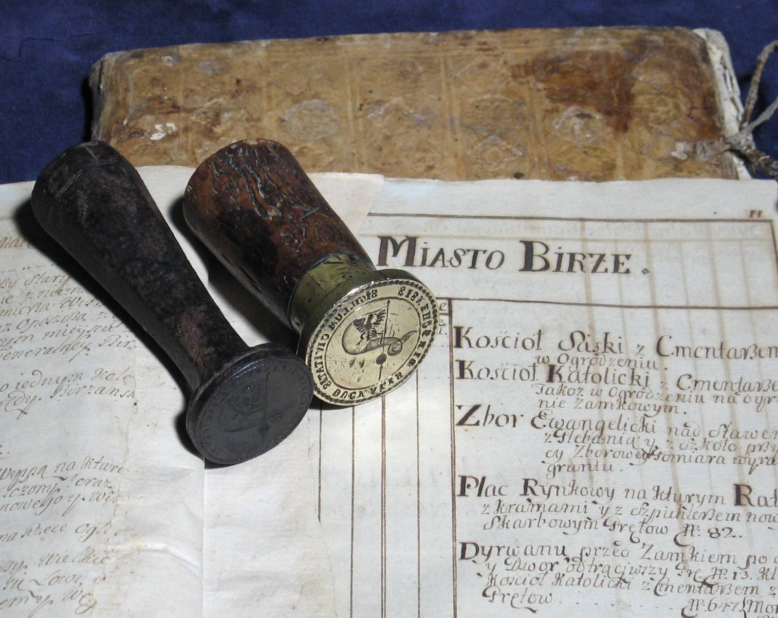 Biržų miesto spaudas